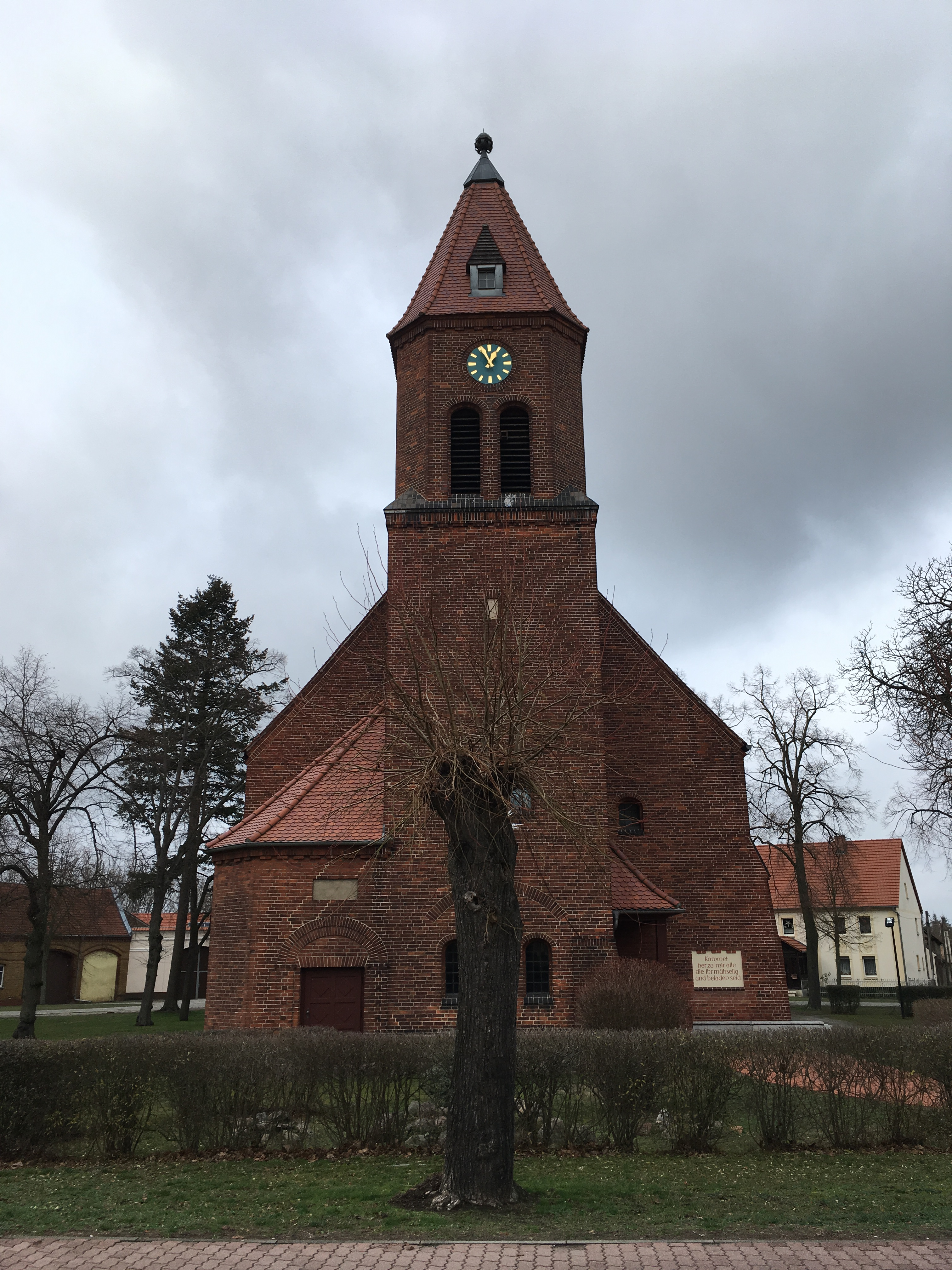 Die Dorfkirche Woltersdorf ist eine neugotische Kirche aus dem Jahr 1911 in Woltersdorf, einem Ortsteil der Gemeinde Nuthe-Urstromtal im Landkreis Teltow-Fläming im Land Brandenburg.